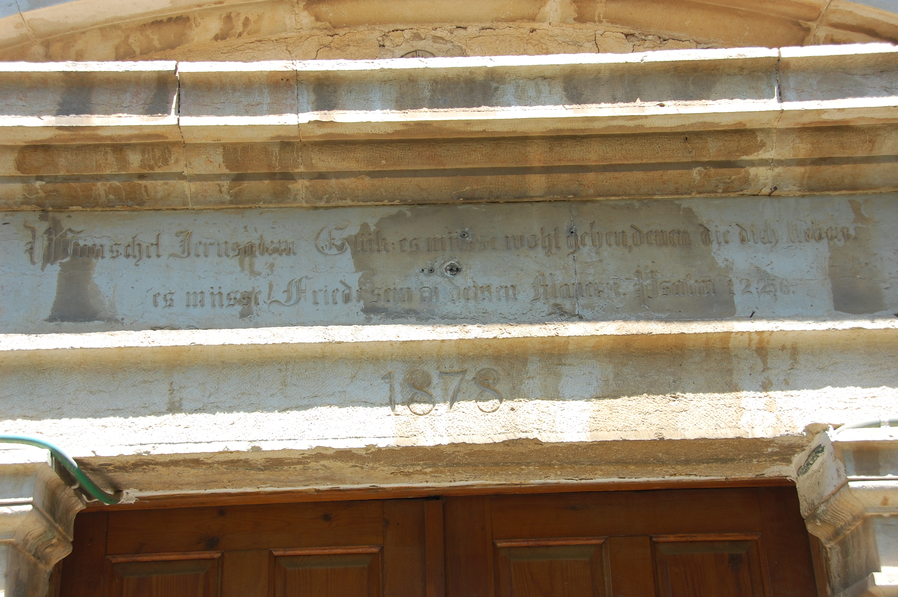 emek refaim 18, jerusalem